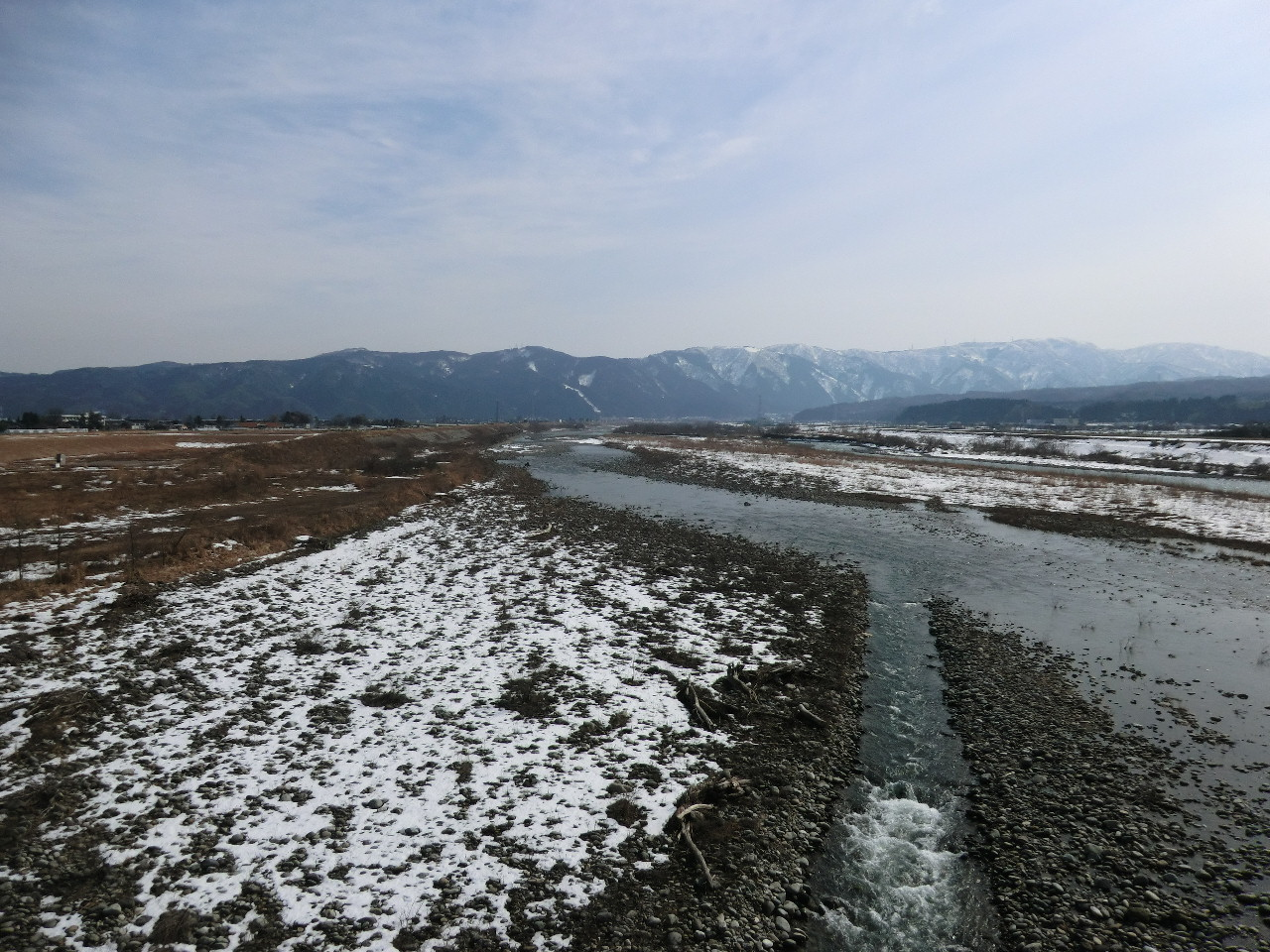 手取川 川北大橋より鶴来側